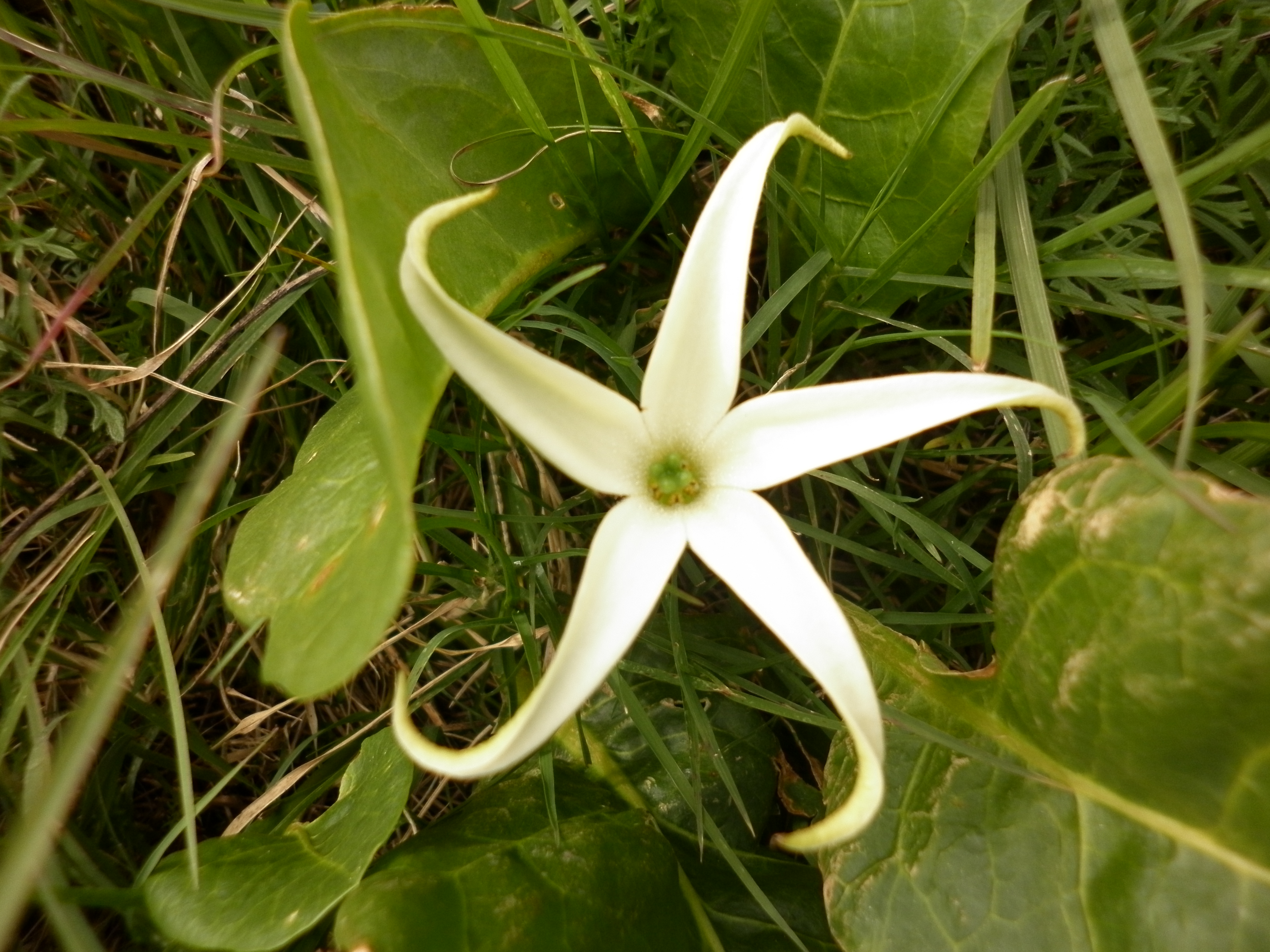 Jaborosa